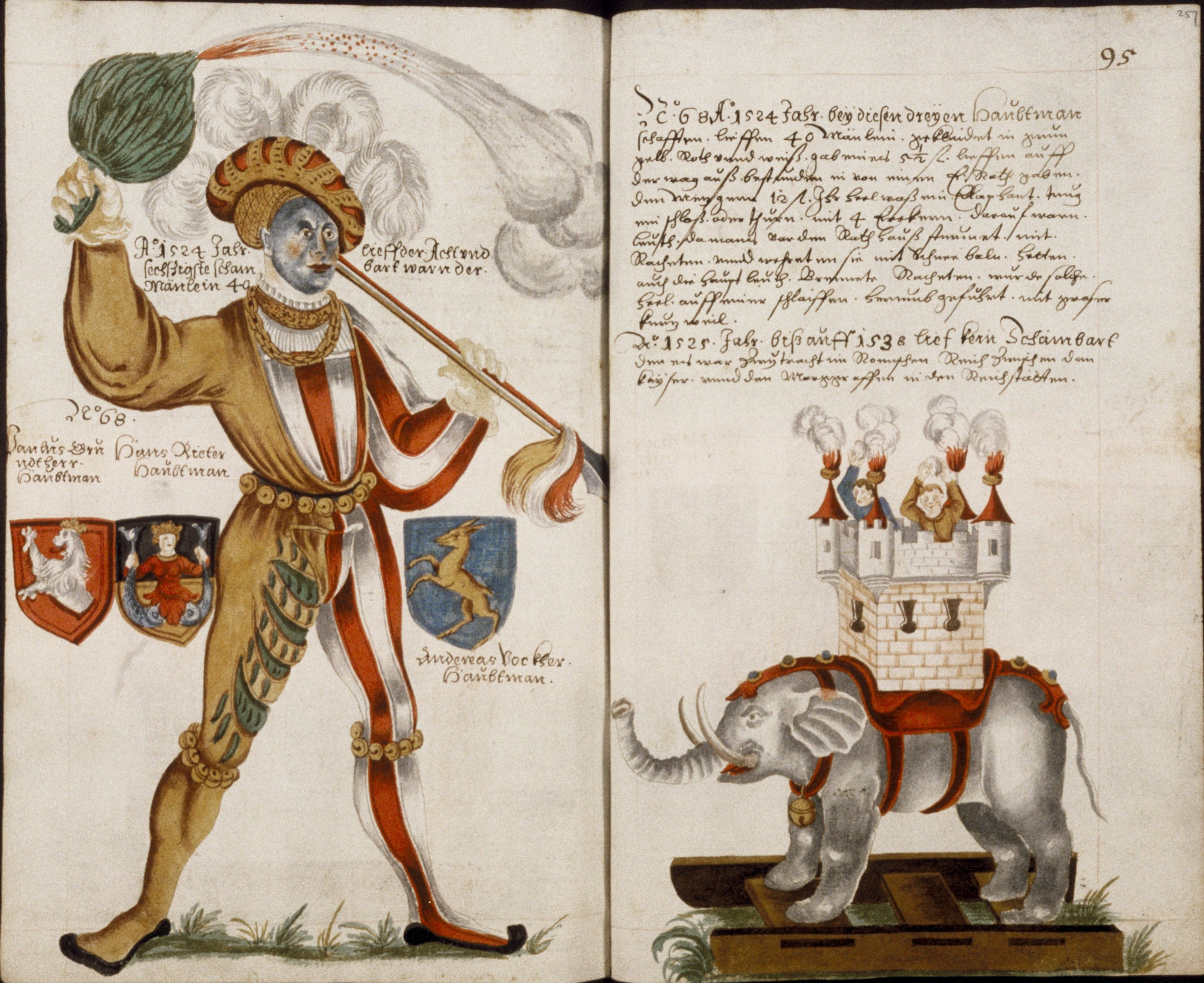 Schembartbuch. Nürnberg. Oxford, Bodleiana Library, MS. Douce 346, Blatt 256v-257r